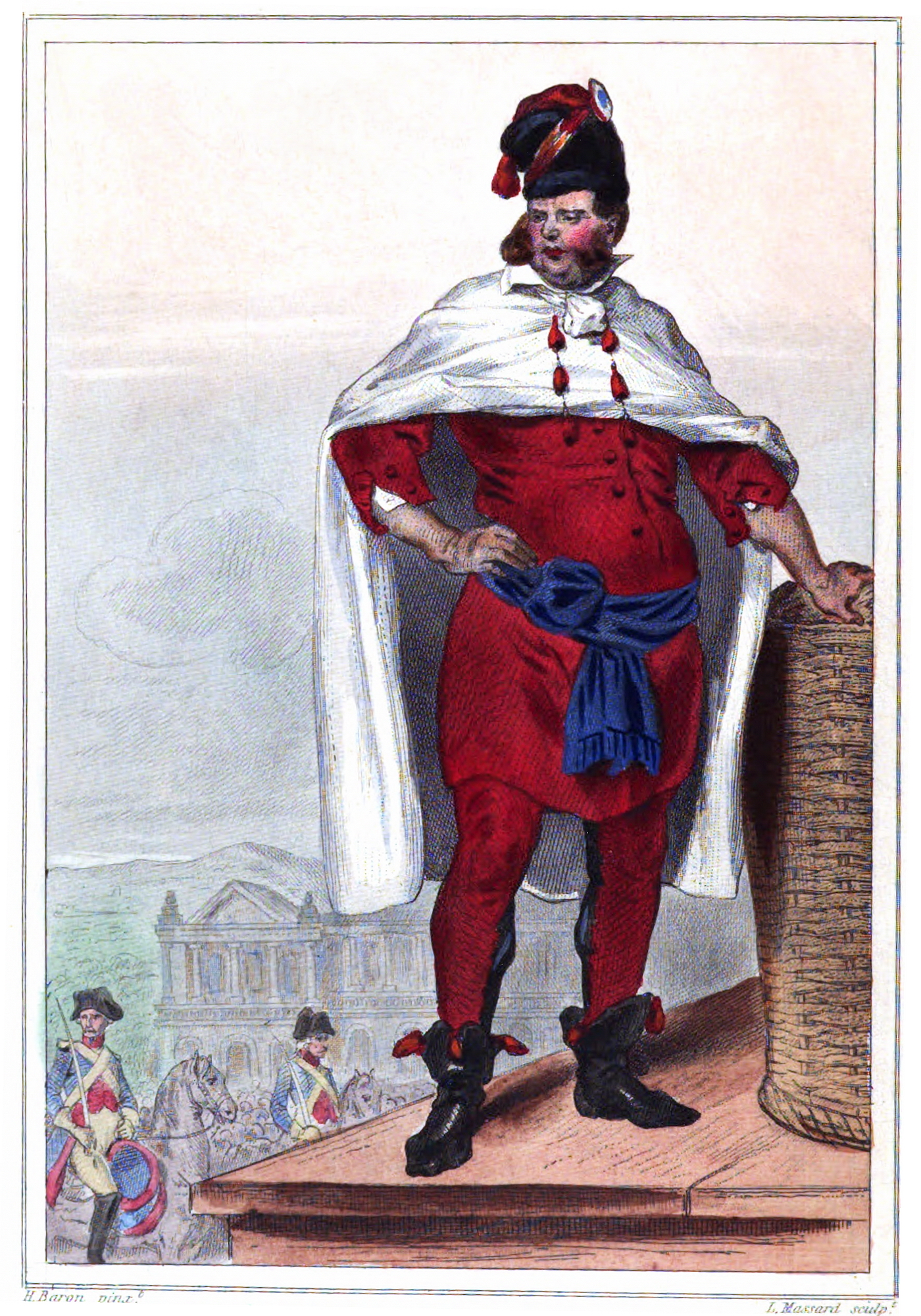 L'exécuteur des hautes oeuvres sous Louis XV (époque de Charles-Henri Sanson)